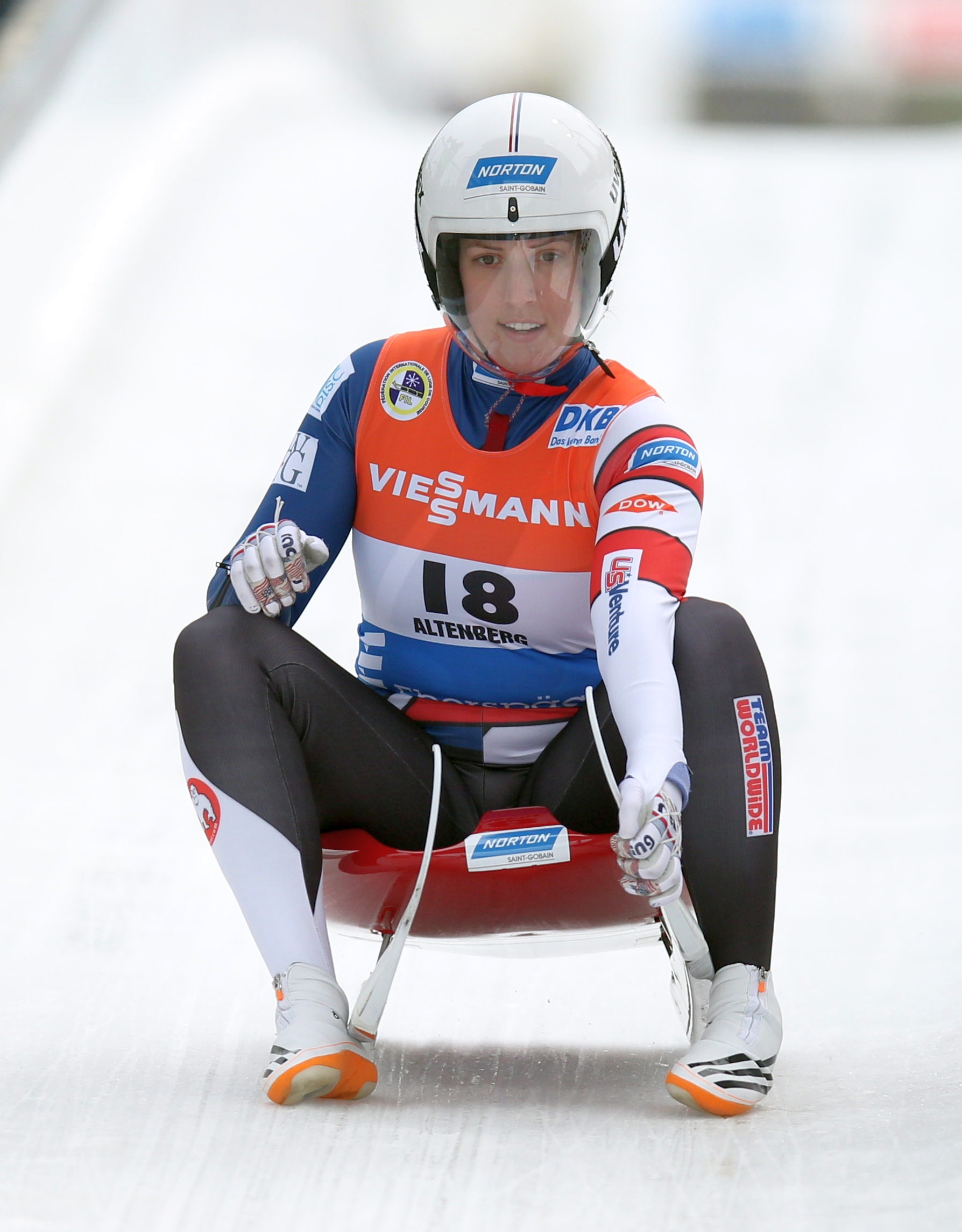 Erin Hamlin beim Rennrodel-Weltcup der Damen in Altenberg 2017